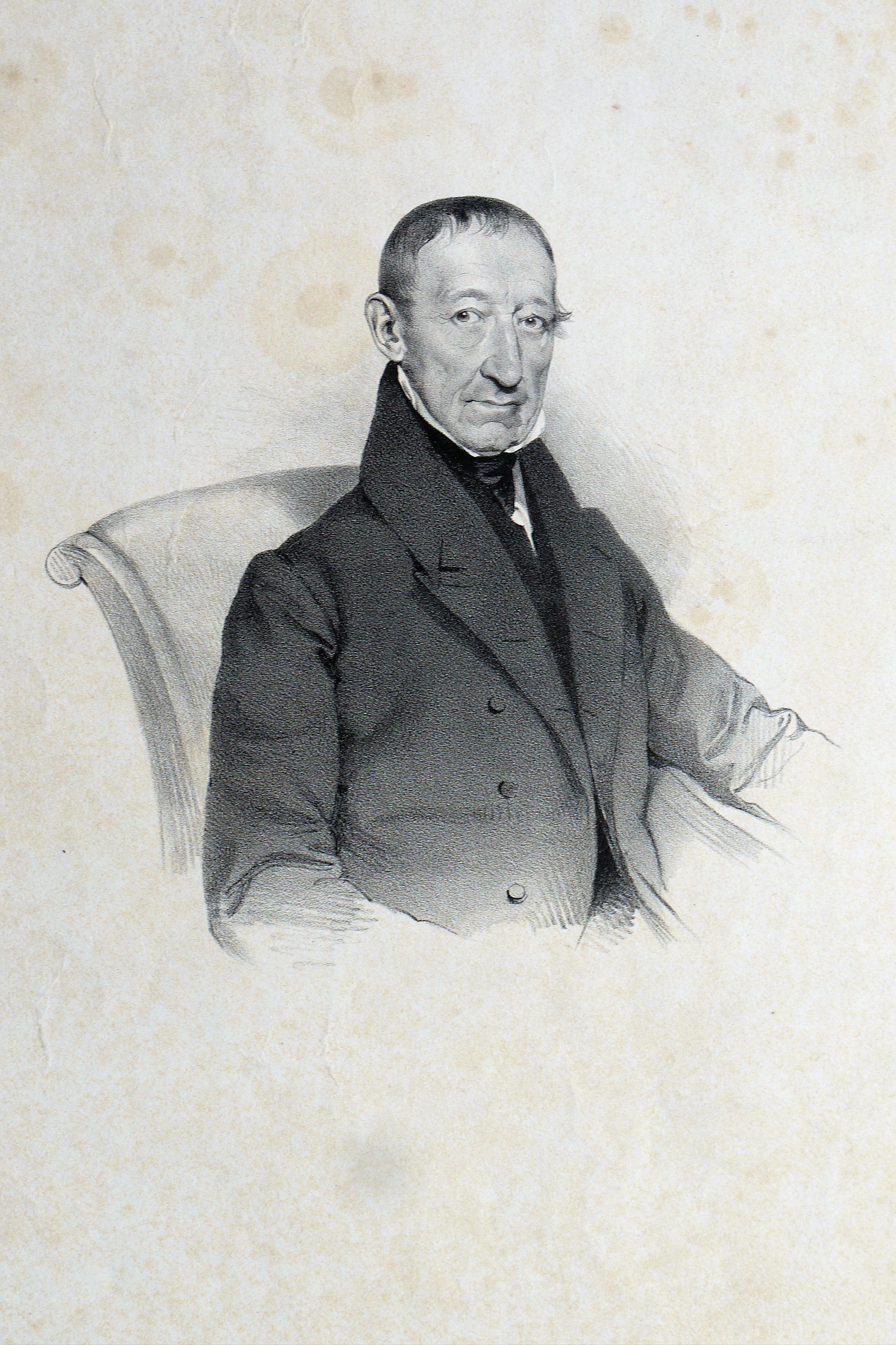 Kaspar Maria Graf Sternberg (1761-1838), Naturforscher, Botaniker Lithographie von Josef Kriehuber, ca. 1830